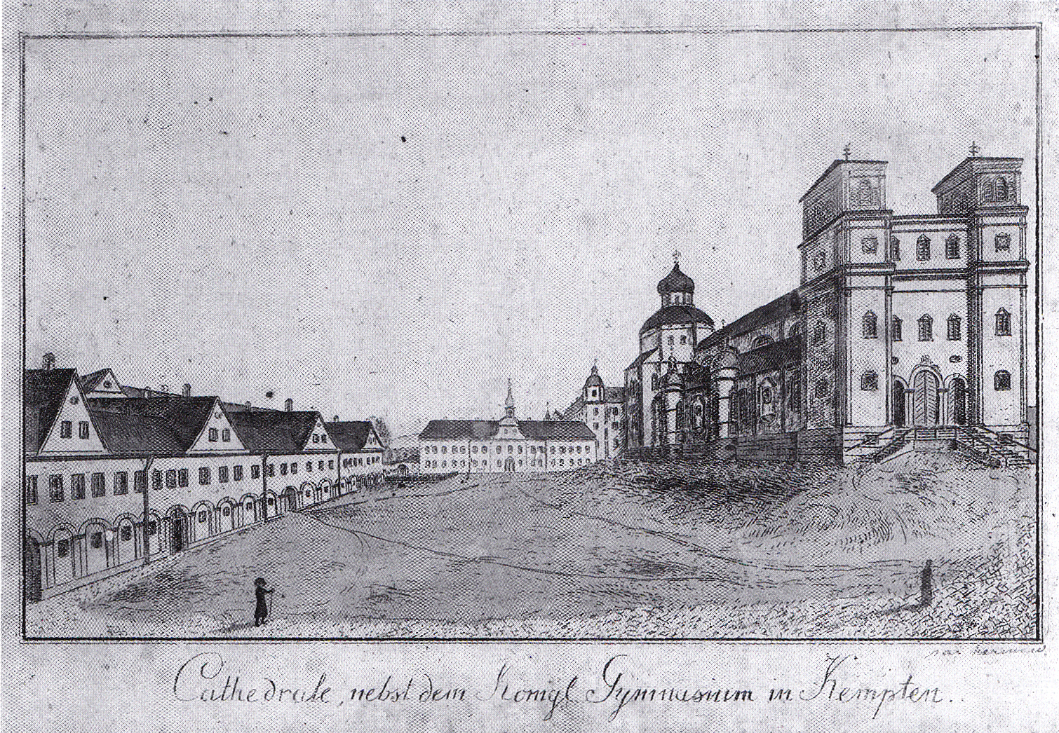 Das Fürststift Kempten. Links: Serrohäuser. Mitte: Pagerie Rechts: St. Lorenz (Kirchen)